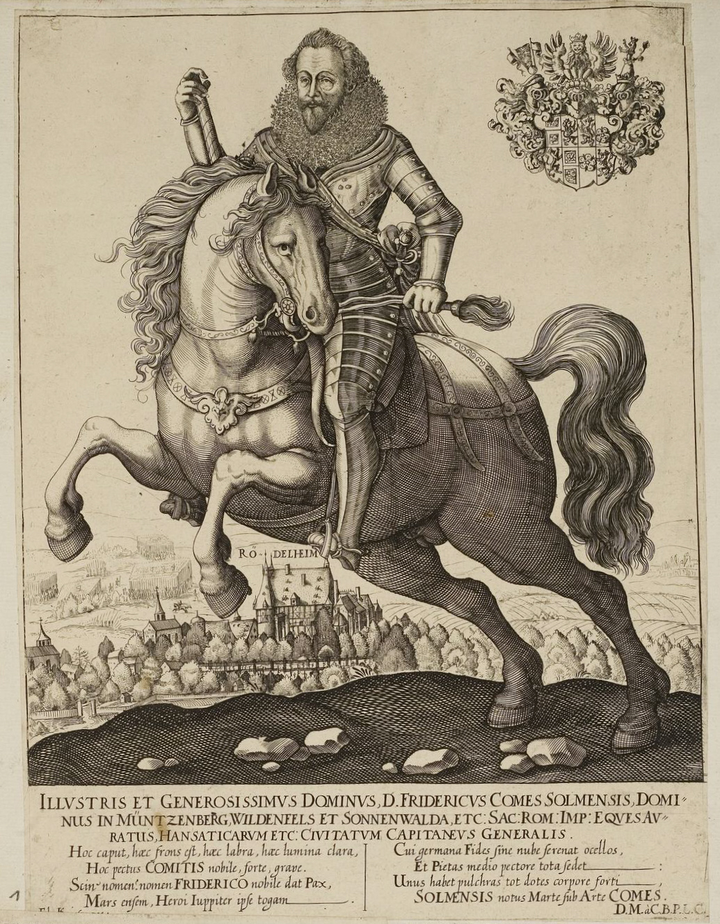 Grafik aus dem Klebeband Nr. 1 der Fürstlich Waldeckschen Hofbibliothek Arolsen Motiv: Friedrich zu Solms-Rödelheim, Kaiserlicher Kämmerer, Kriegsrat und Obrist